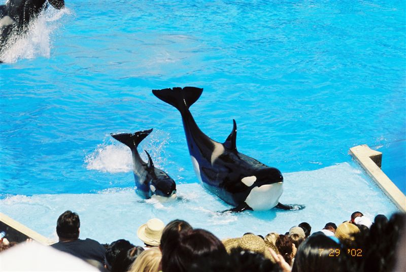 Orca "Killer Whale" in US amusement parkF1060004